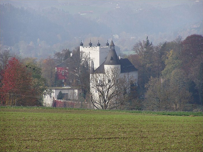 Blick von Wilhering auf das Schloss Ottensheim